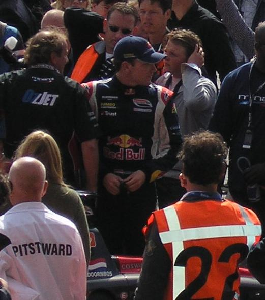 Robert Doornbos met de pers (ingezoomed)